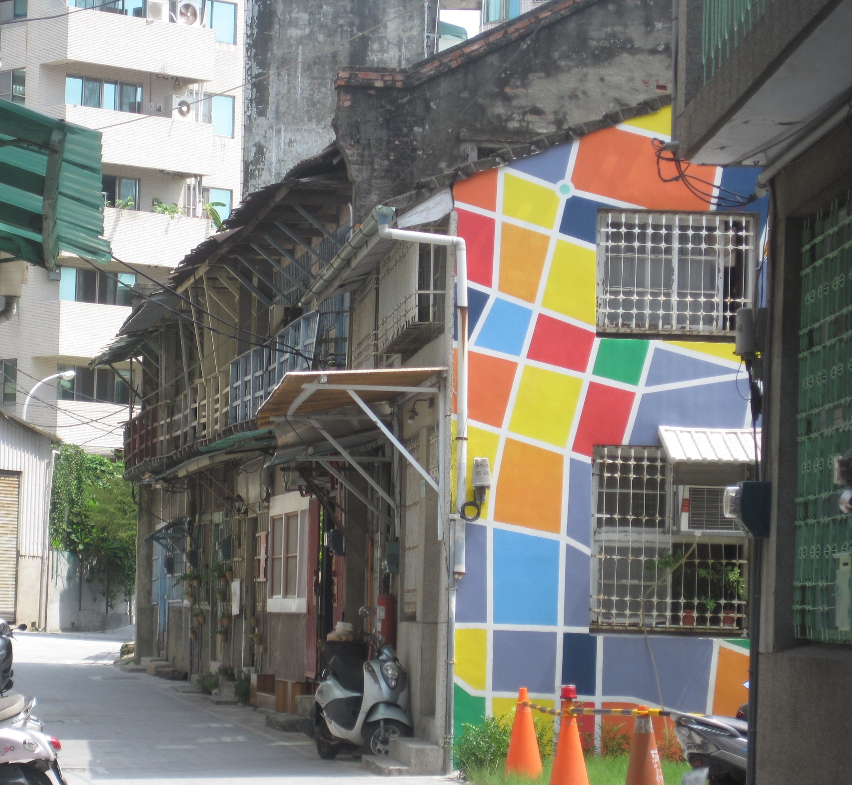 臺南原清水寺街連棟街屋